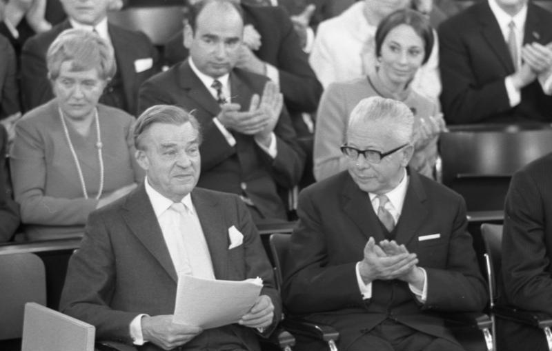 Verleihung des Friedenspreis des Börsenvereins des Deutschen Buchhandels an Gunnar und Alva Myrdal (Schweden) in Anwesenheit von Bundespräs. Heinemann in der Frankfurter Paulskirche